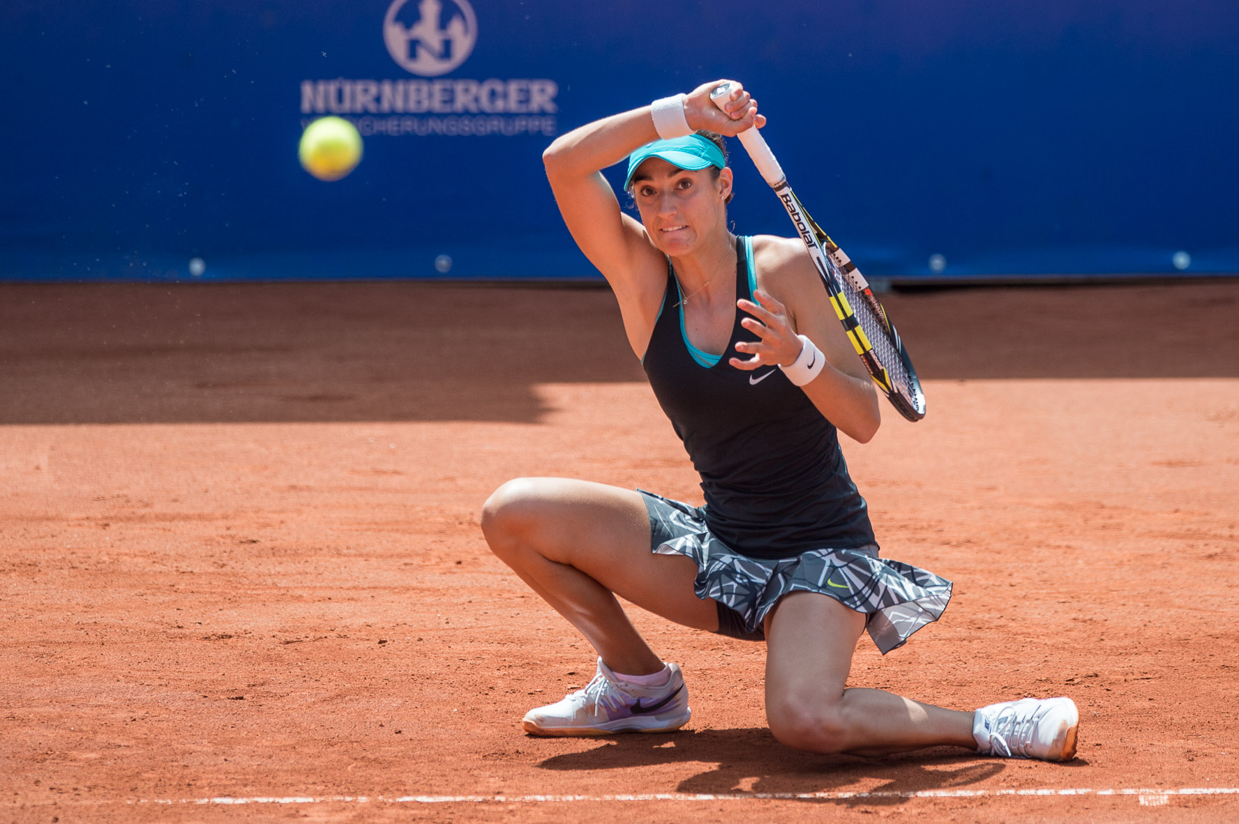 Caroline Garcia,Damentennis,Nürnberger Versicherungscup 2014,Tennis,WTA